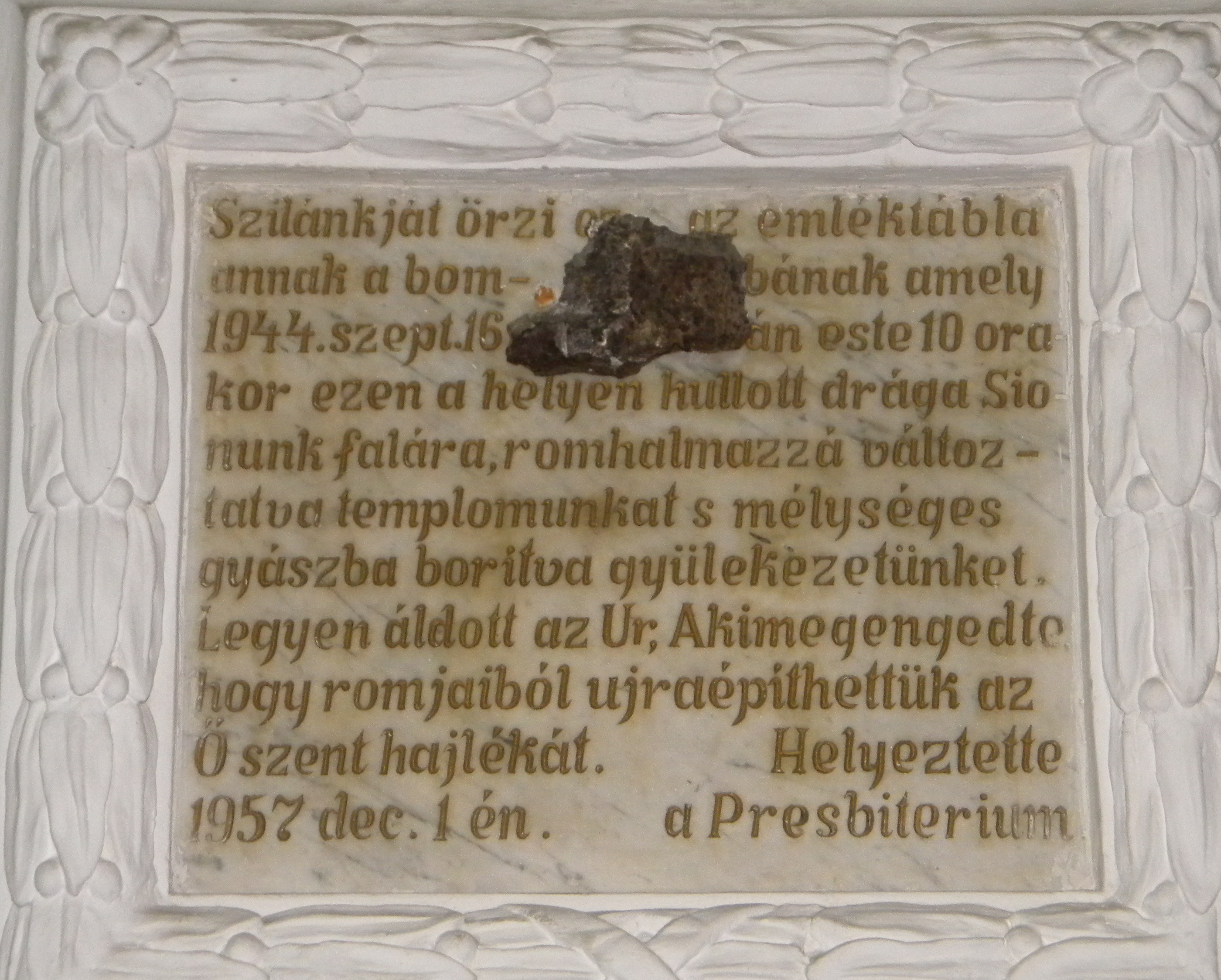 Emléktábla a második világháborús bombatalálat utáni újjáépítés emlékére a Szatmárnémeti Láncos templomban